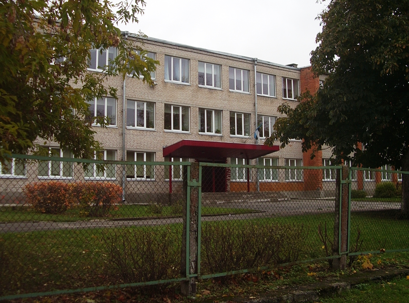 Paldiski Vene Gümnaasium, Peetri 26